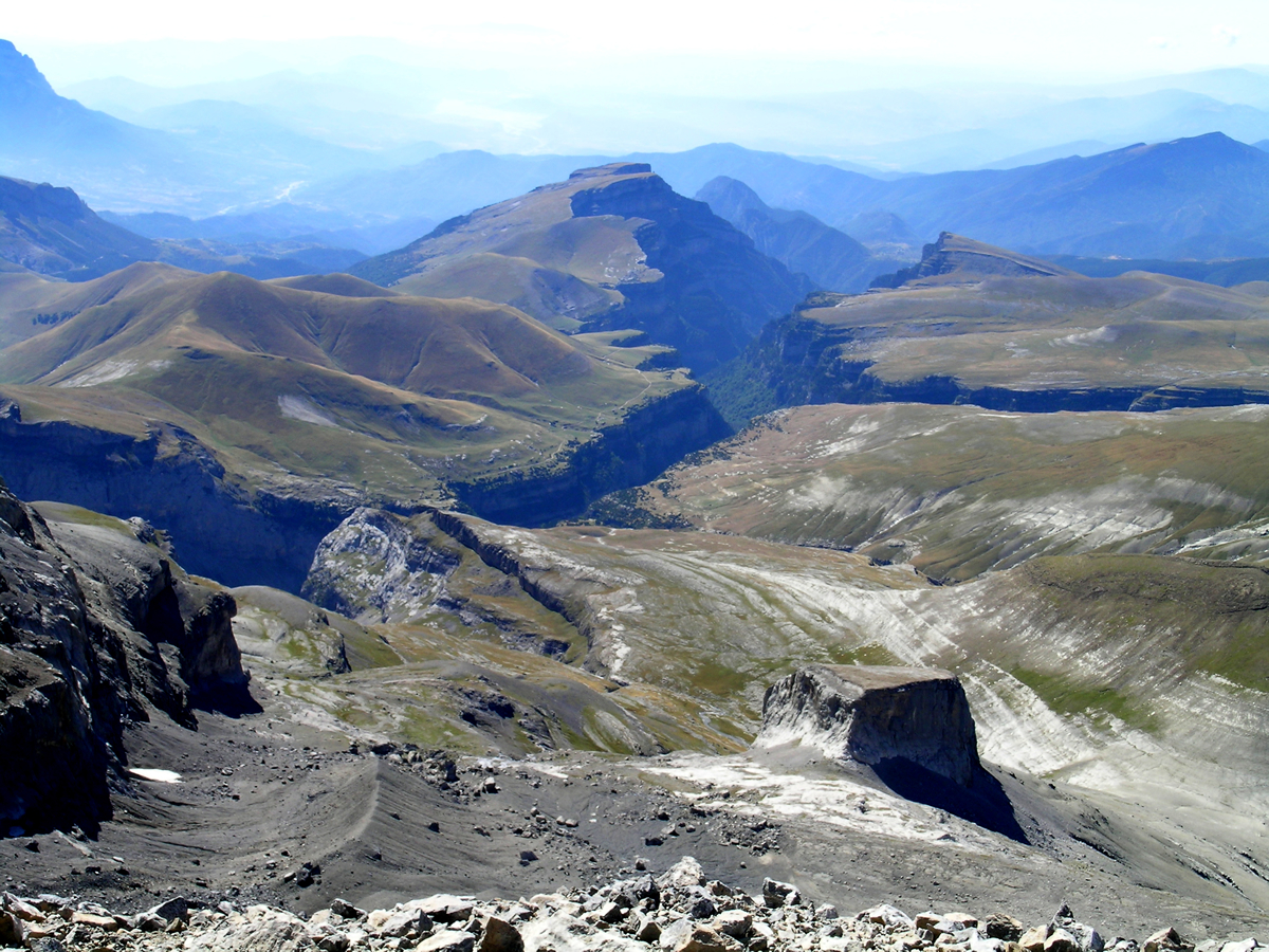 Cañón de Añisclo desde la cima de Monte Perdido, Añisclo (Huesca)